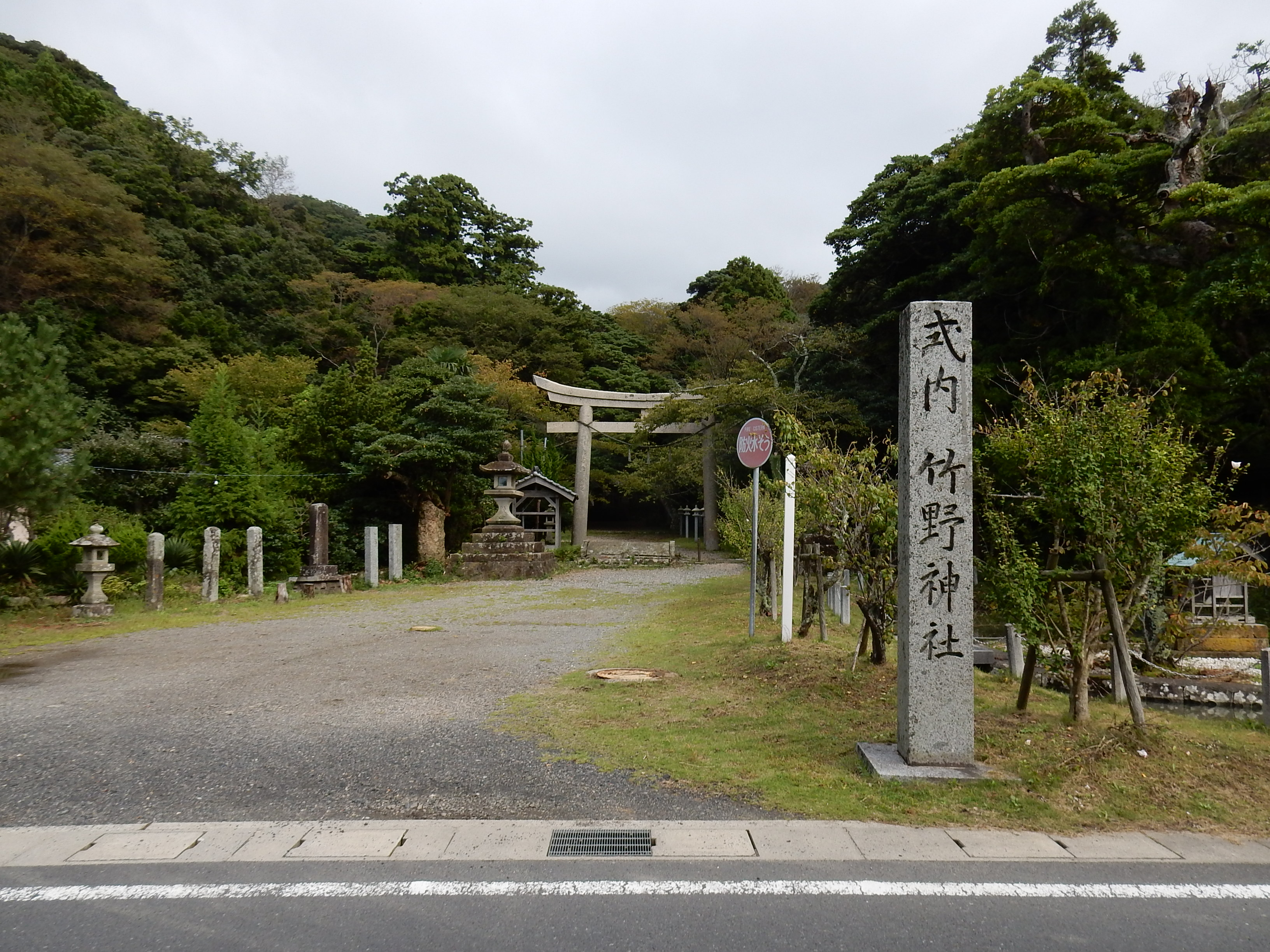 竹野神社（たかのじんじゃ） 京都府京丹後市丹後町宮 三の鳥居